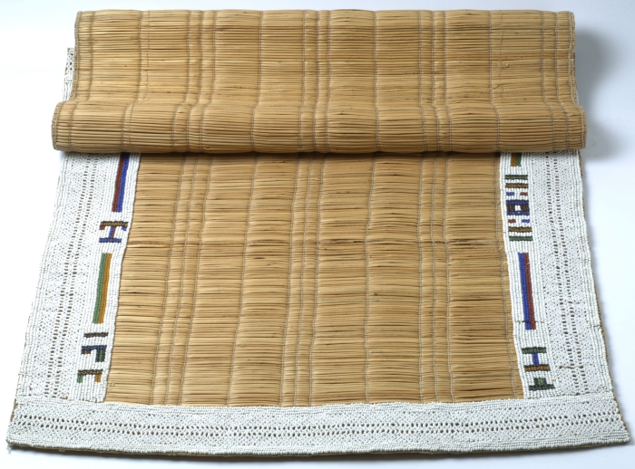 Een langwerpige mat vervaardigd uit een dubbele laag biezen. Langs de zijkanten is een kralenversiering aangebracht. Aan de lange kant zijn geometrische figuren in het kraalwerk verwerkt.